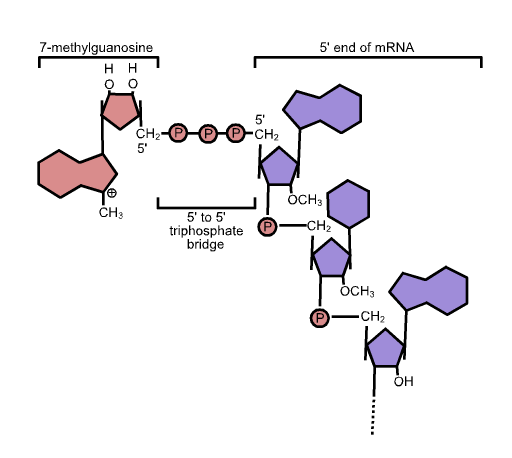 5' cap structure